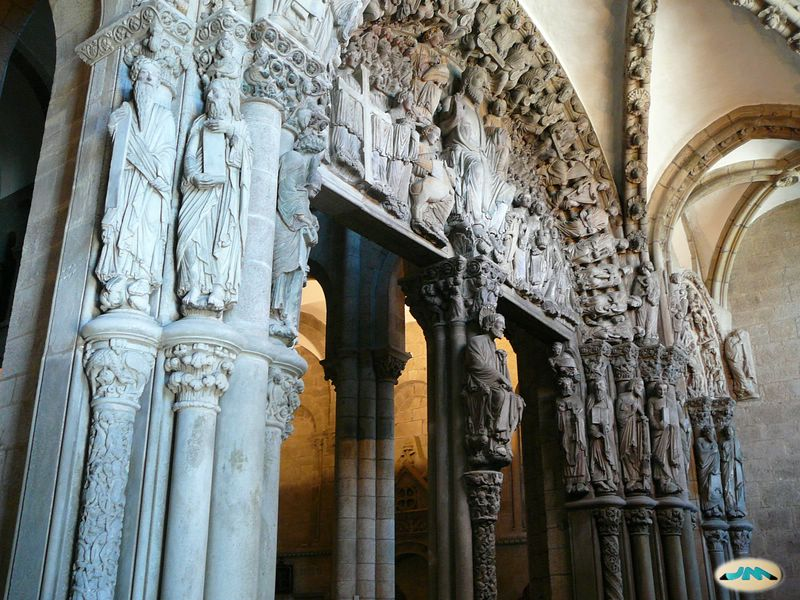 Santiago-Catedral-Portico de la gloria09